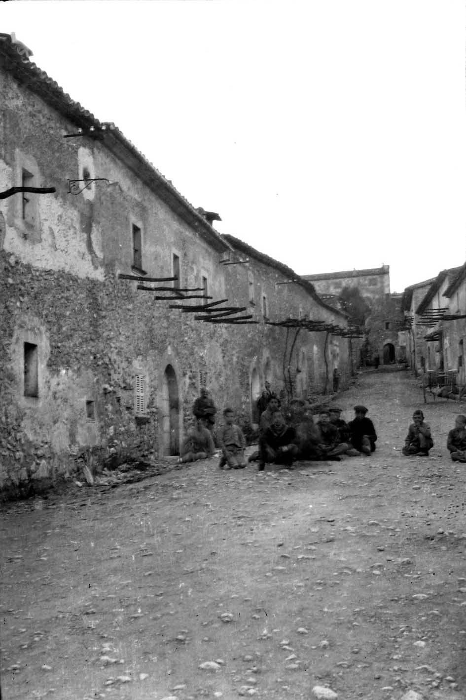 Casa i carrer. Francesc Matheu i Fornells (1920)